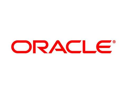 Logo Oracle Corporation